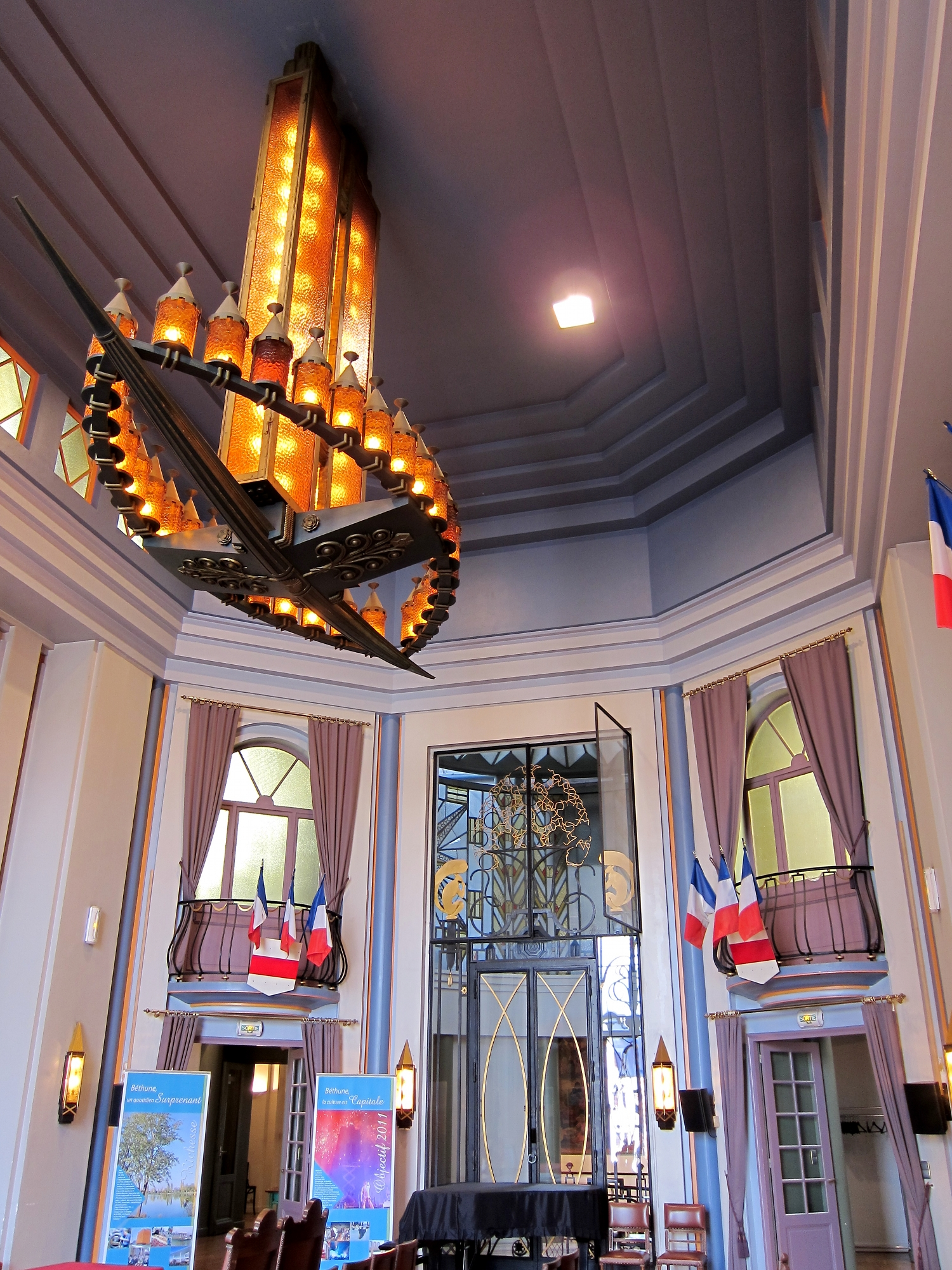 Le salon art déco de l'hôtel de ville de Béthune (Pas-de-Calais).